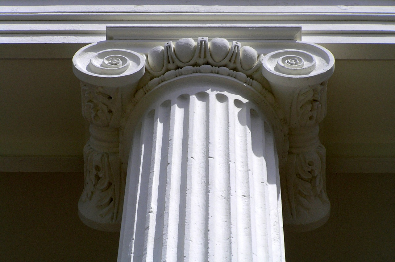 Ionic Column detail